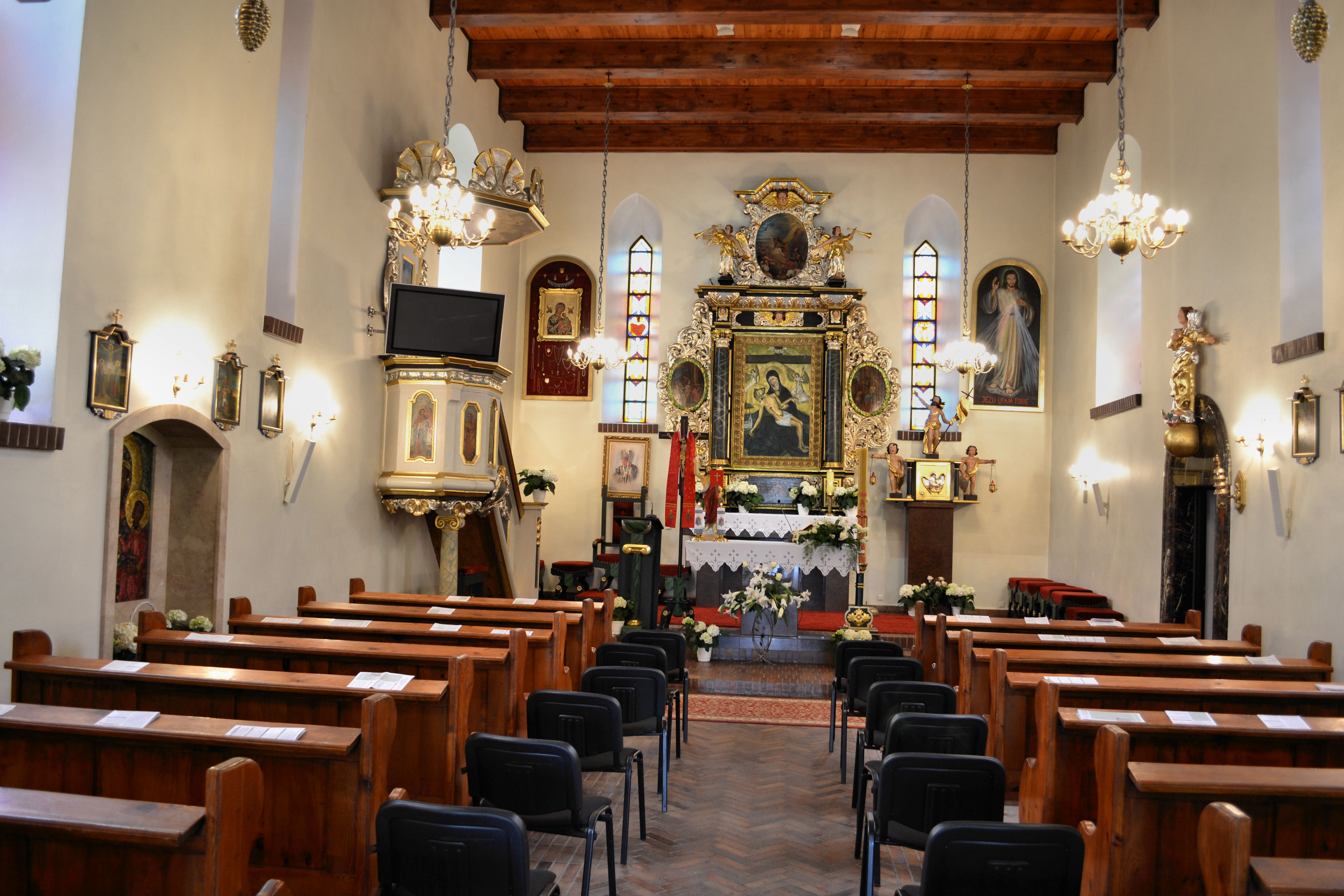 Kościół Matki Boskiej Bolesnej w Mierzynie koło Szczecina